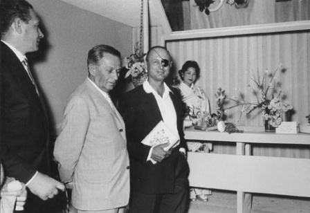 אבא חושי ומשה דין בתערוכת הפרחים ה-9 הבינלאומית בחיפה, 29.4.1960